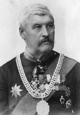 Пётр Владимирович Алабин — русский государственный и общественный деятель